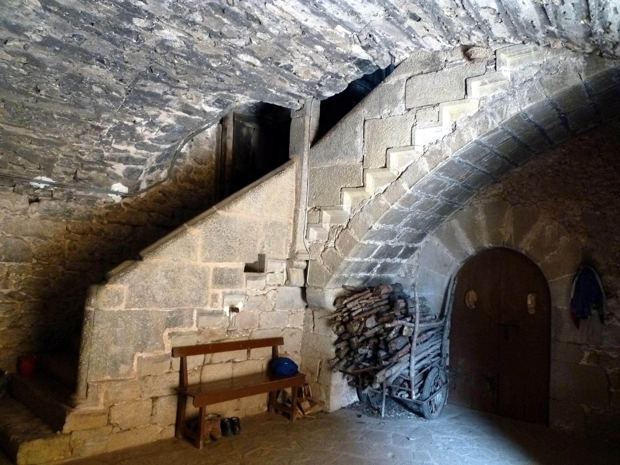 Masia Casanova de Clarà (Castellar de la Ribera): escales interiors